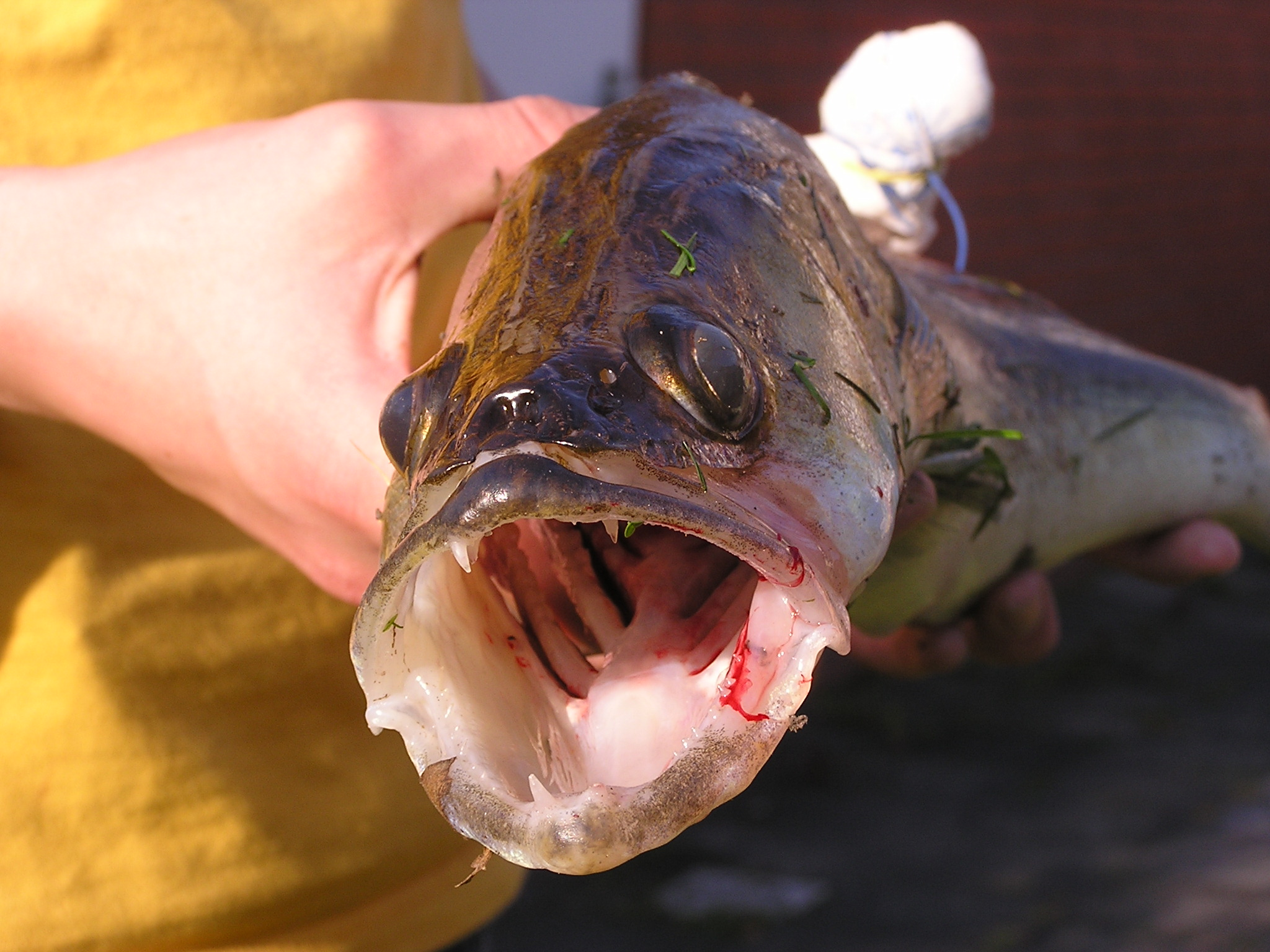 Maul eines Zanders